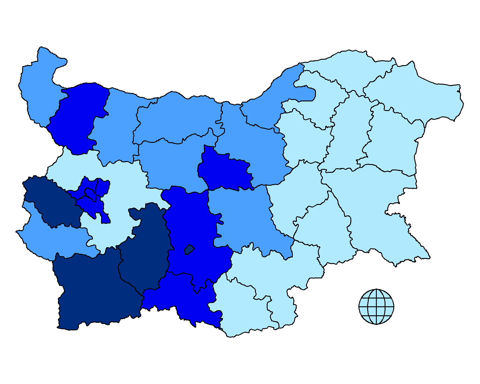 Гласуване по райони за Обединени демократични сили на парламентарните избори през 2005. Всеки от цветовете съответства на приблизително 1/4 от подадените гласове По тъмният цвят съответства на получен по-голям процент от гласовете